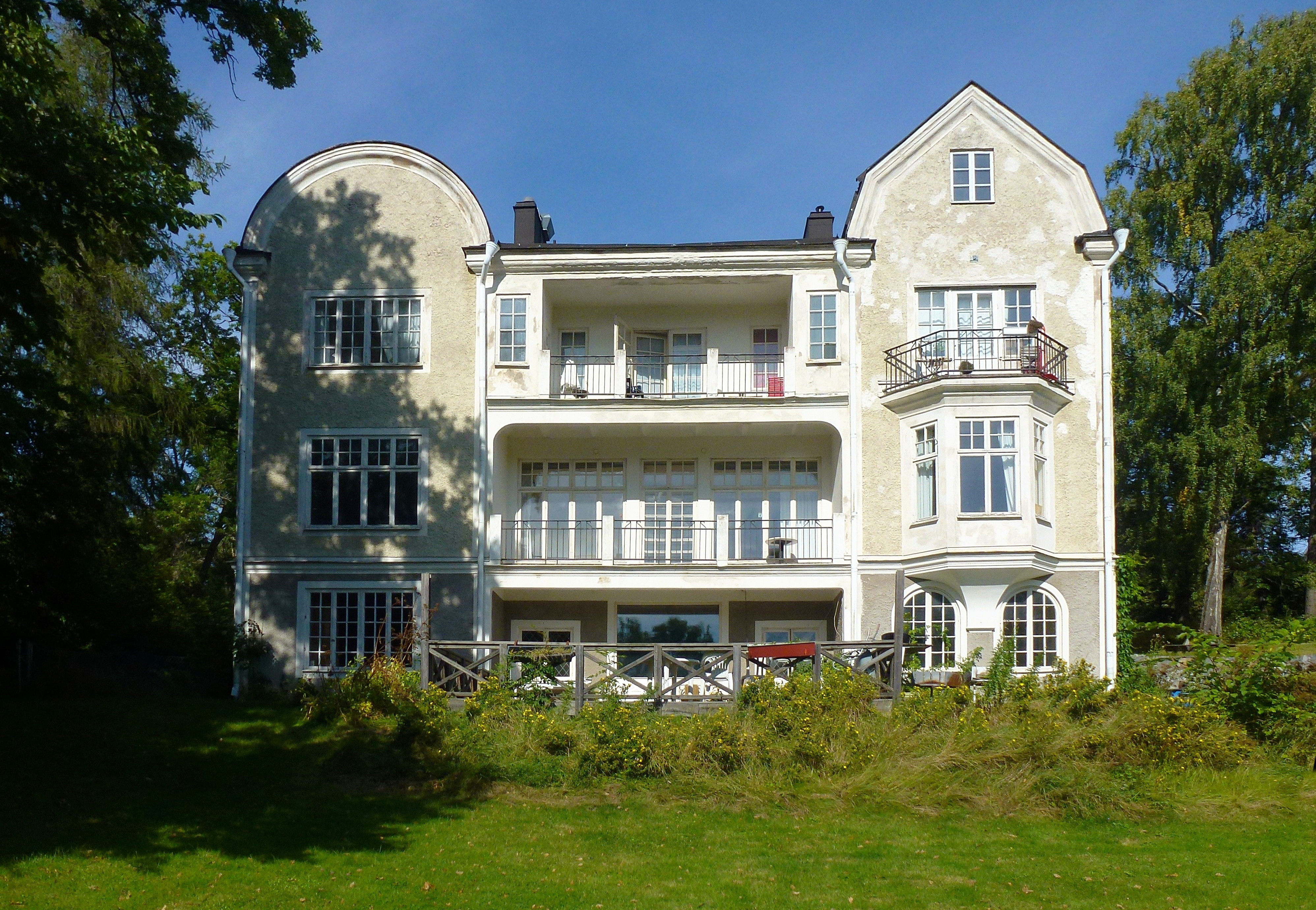 Villa Strandvik i Gustavsberg, arkitekt Ferdinand Boberg, 1911